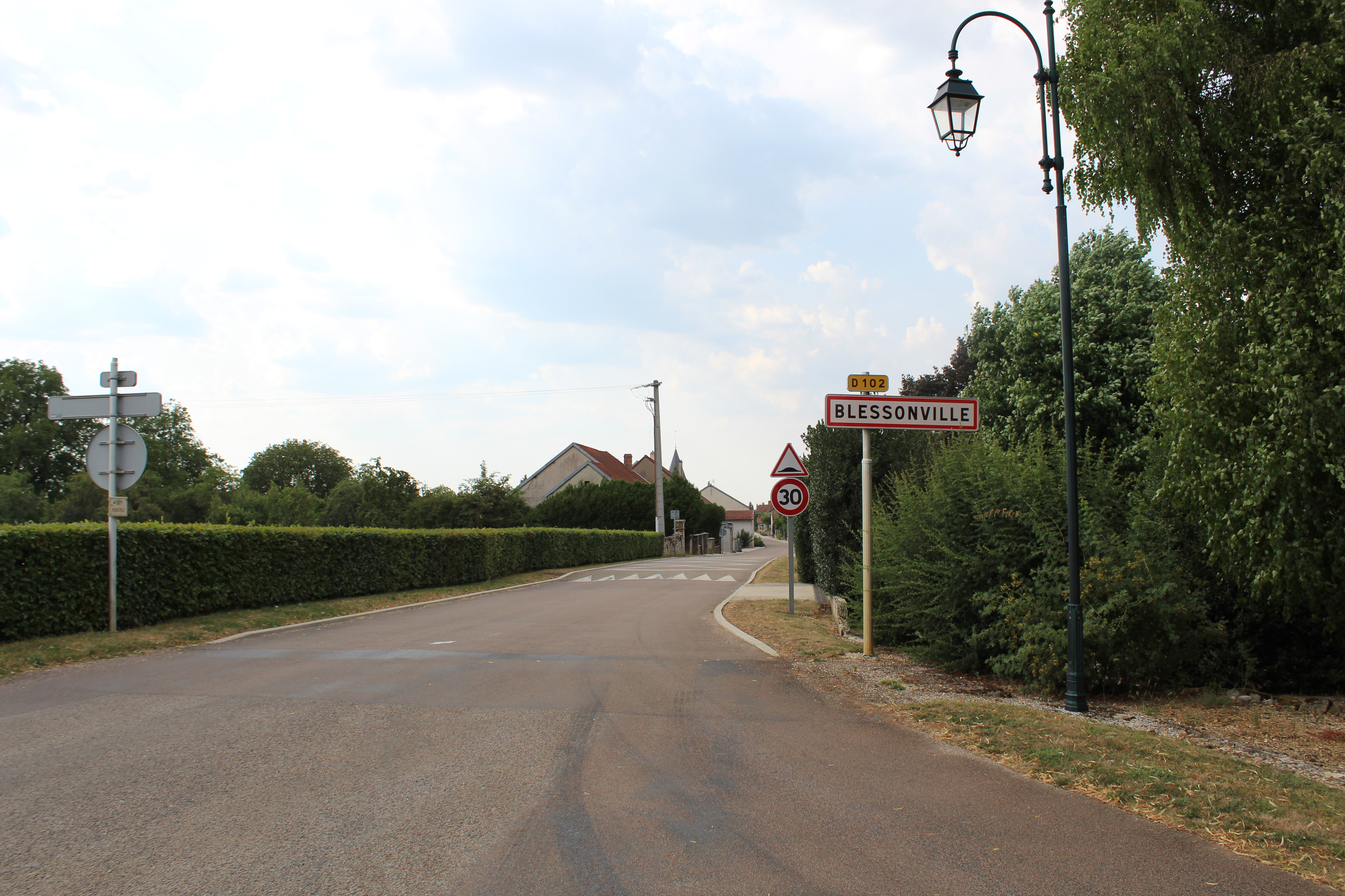 Entrée du village